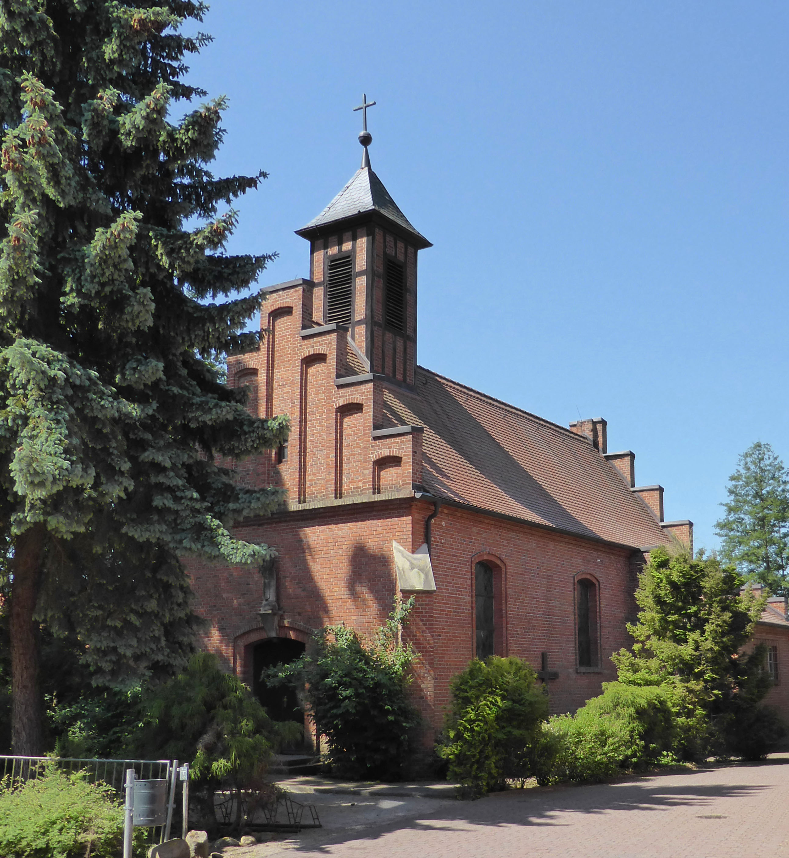 Katholische Kirche in Beetzendorf.